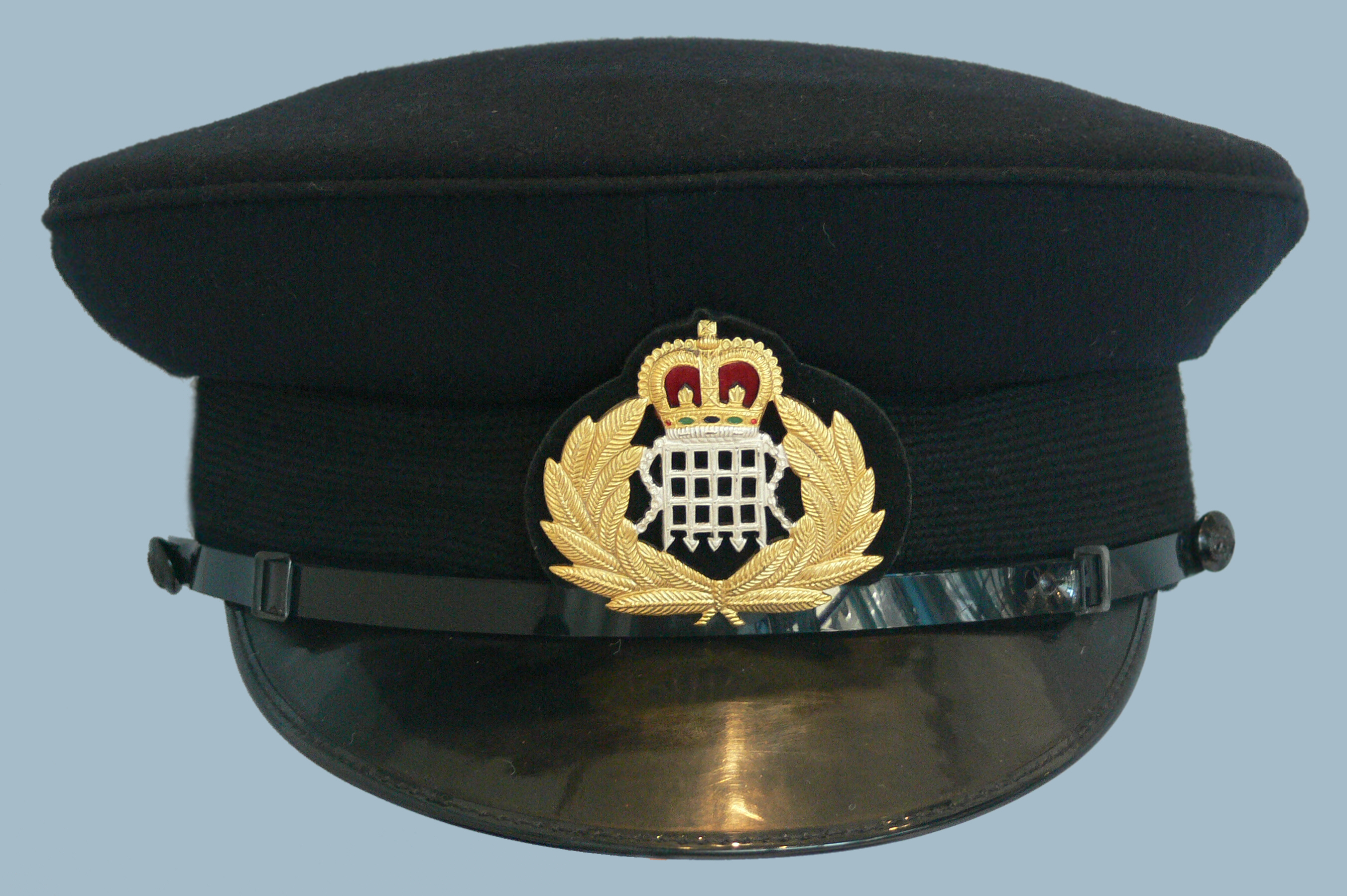 Hamburg, Deutsches Zollmuseum, Zollmütze aus Großbritannien